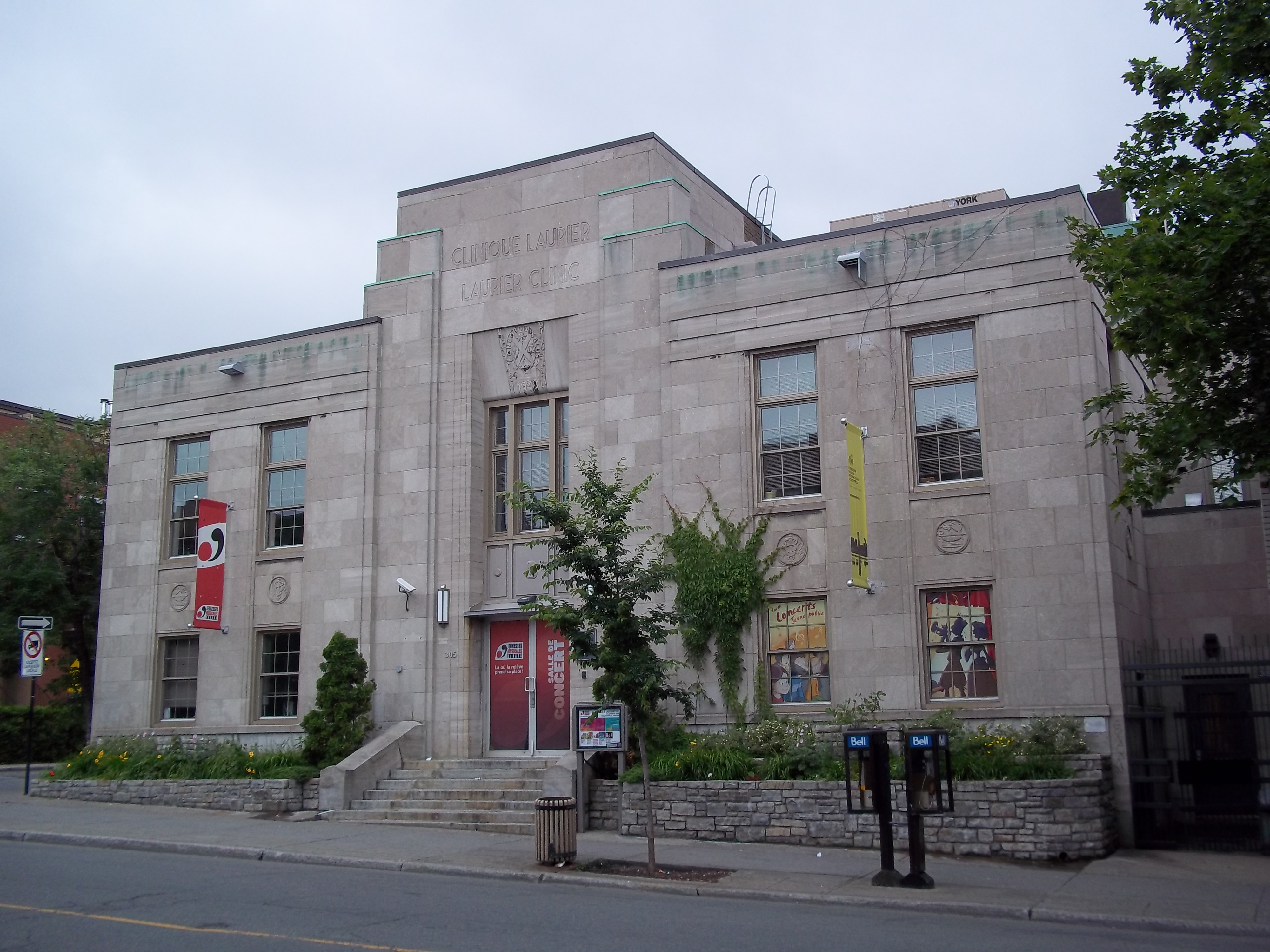 Maison des Jeunesses Musicales du Canada, 305, avenue du Mont-Royal Est, Montréal. Elle abrite une salle de concerts pouvant accueillir un auditoire de 100 personnes. Jeunesses Musicales : Maison des JMC